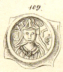 Münze (Bracteat) mit dem Bildnis des Fürstbischofs Lüthold II. (=Lutold) von Basel. „Brakteat. Mitrierte Büste von vorn mit Streifen auf dem Gewand, welches in der Mitte von einem Ring gehalten wird, darüber LVT - OLd', umher ein glatter Reif. 0,36 g.” Christian Winterstein: Bistum Basel - Corrigenda. In: Schweizer Münzblätter, Heft 212, Band (Jahr): 53-55 (2003-2005), S. 79-82 [1]